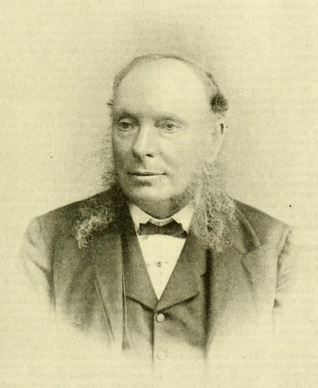 William Bull, 1828 - 1902, botanist and nurseryman